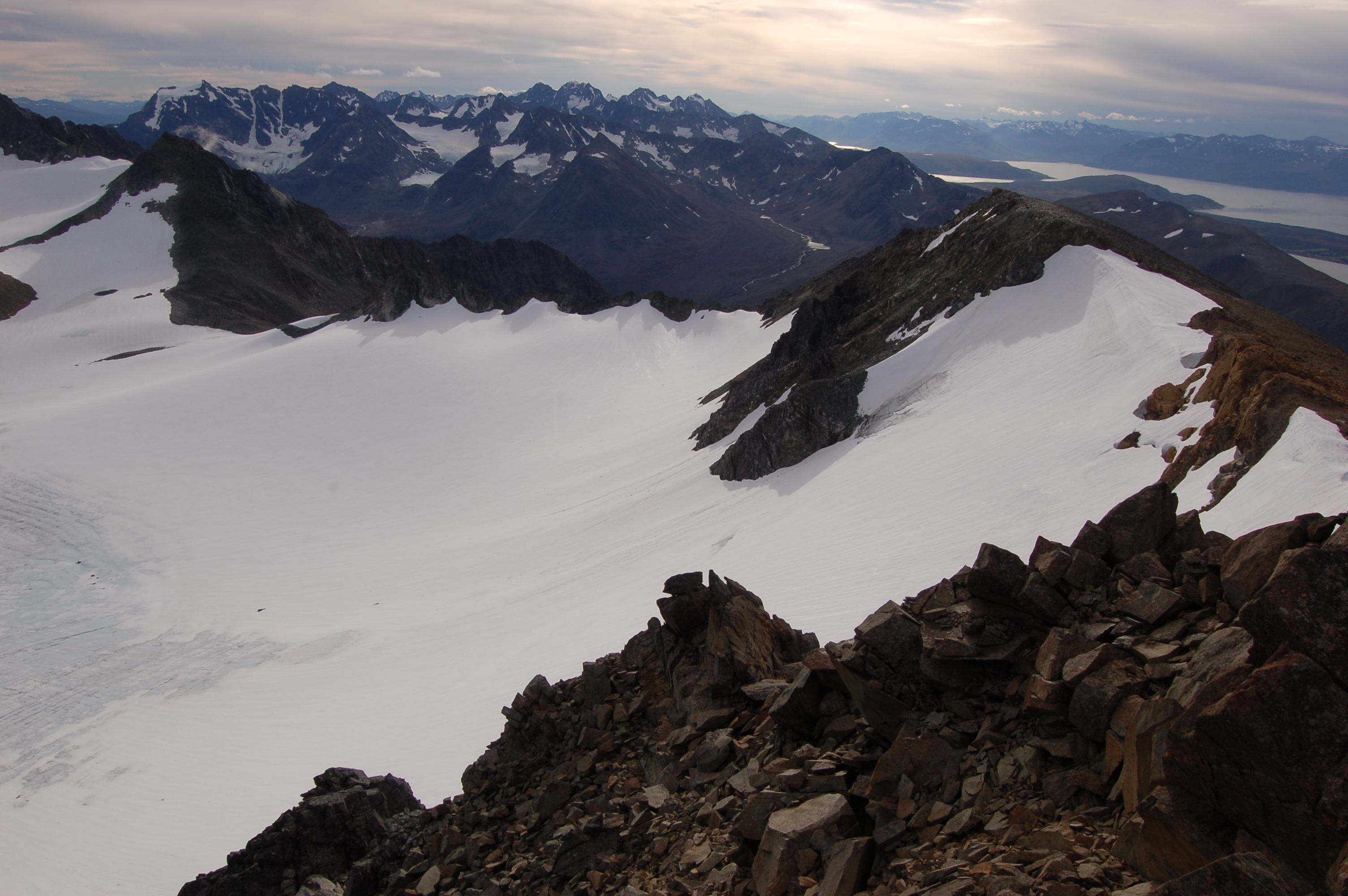 Storgalten. Mot sør. Lyngsalpan. Gamvikblåisen